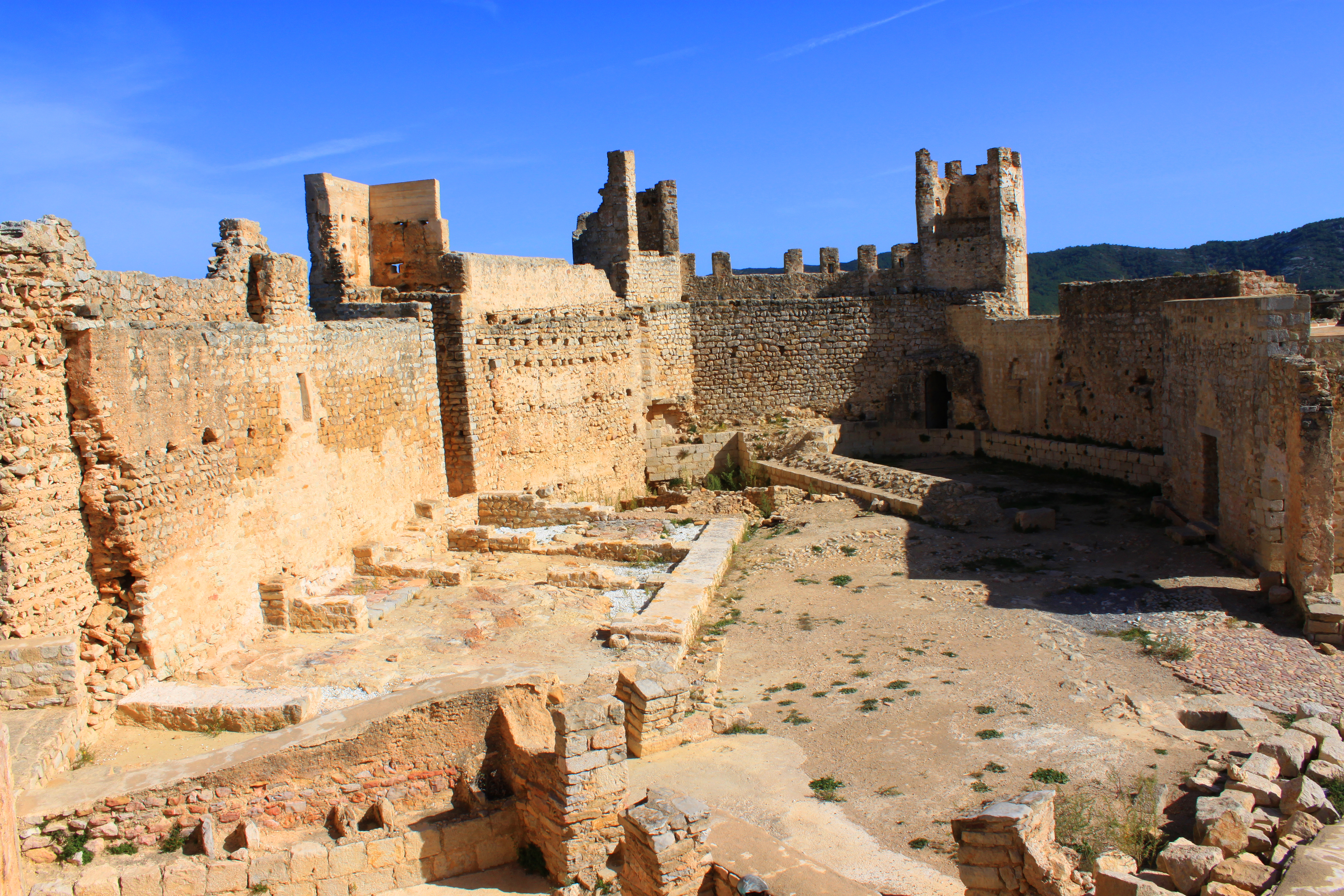 Castillo de Xivert. Interior del recinto de la alcazaba. Se observan a la derecha las construcciones adosadas a la muralla sur, en el centro de la imagen la muralla este con dos las dos grandes torres circulares de sillería construidas por la Orden del Temple en el siglo XIII. A la izquierda se observa la muralla norte con una torre. En el centro de la imagen se distingue el espacio ocupado por el patio de armas y por los edificios del alcázar. Alcalá de Xivert, provincia de Castellón, Comunidad Valenciana, España..